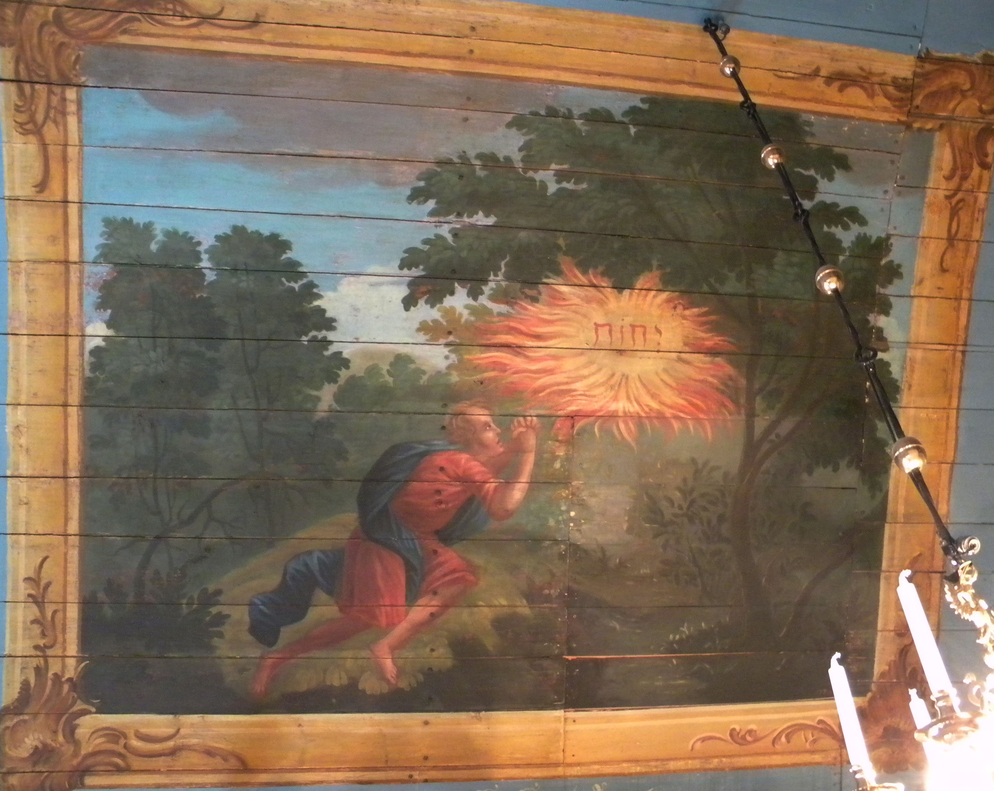 Takmålning från 1770 med tetragrammet JHWH i Skepplanda kyrka